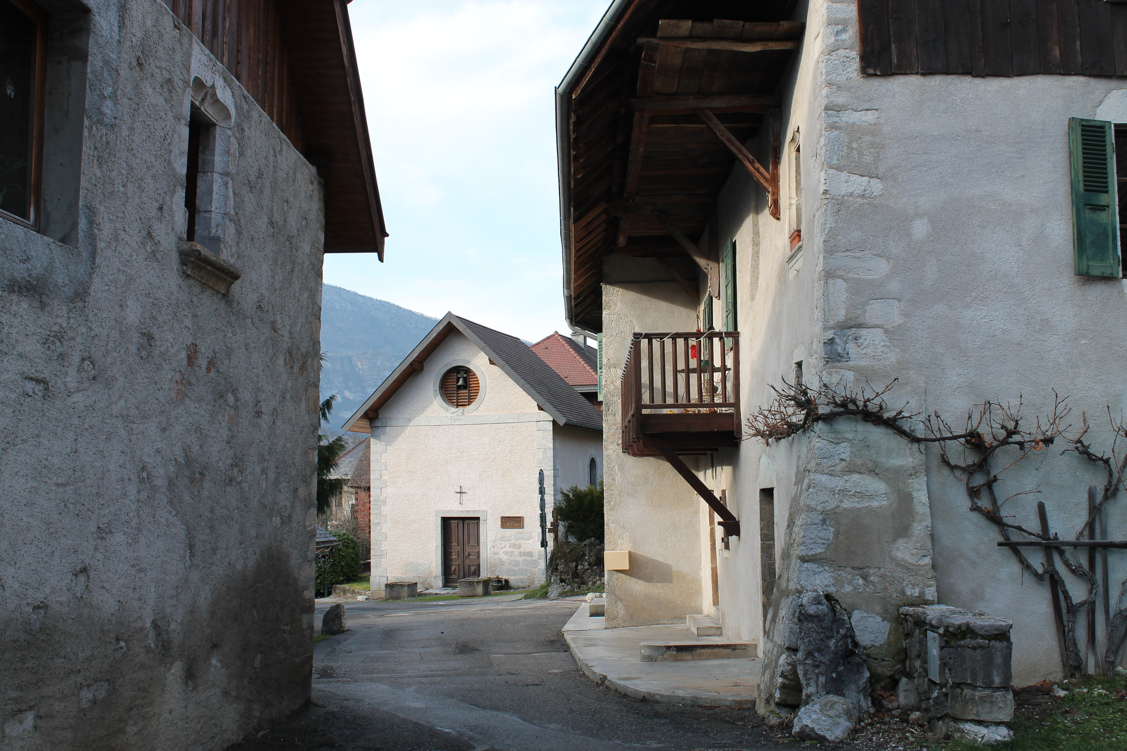 Chapelle de Notre-Dame de la Nativité de Verthier